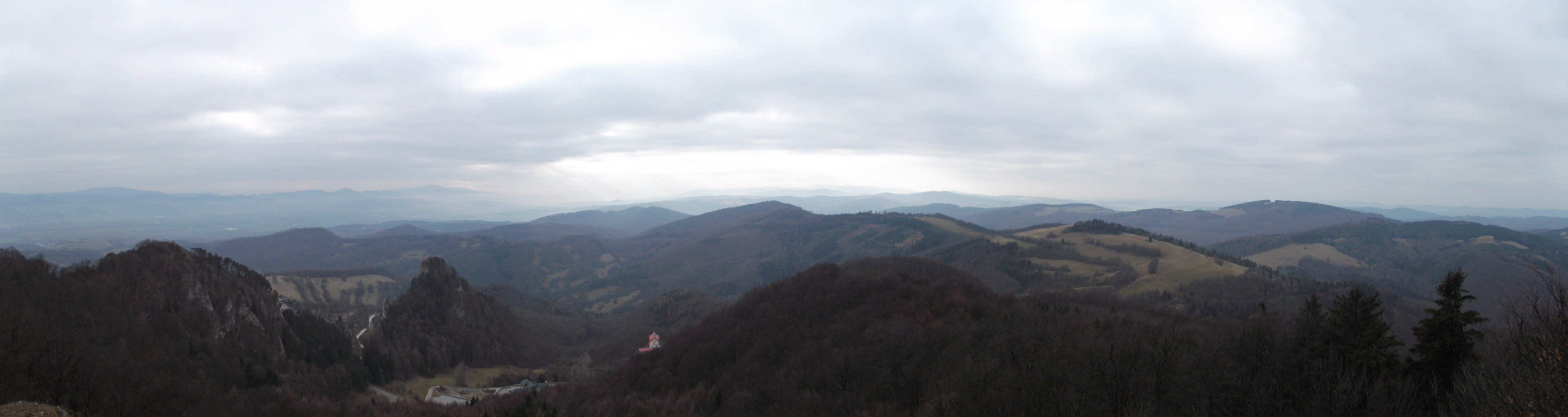 Pohľad z Chmeľovej na hradné bralo Vršatec